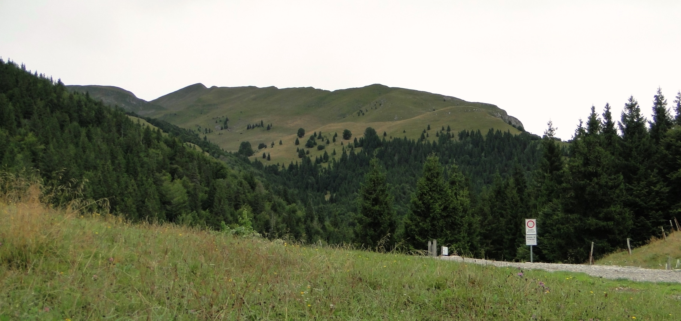 Loc. Belloro con vista sul monte Golla, Prealpi bergamasche. Premolo (BG)